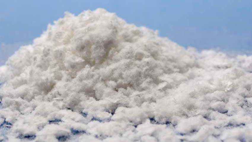 Kunstschnee liegend, Movie Snow FSX